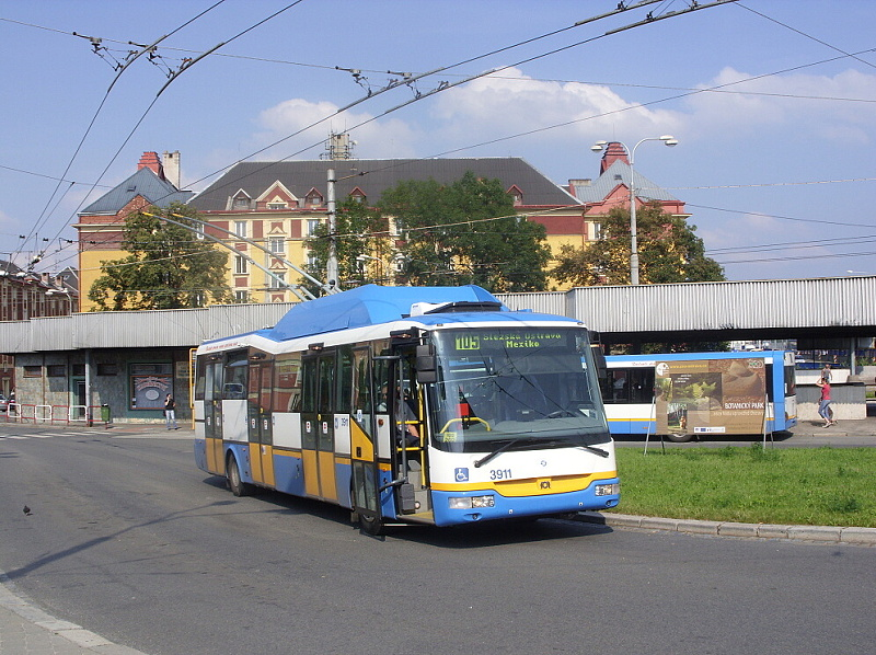 Ostravský částečně nízkopodlažní trolejbus SOR TN 12 C